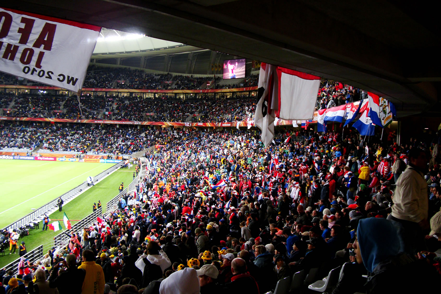 Porción del estadio Green Point en donde se aprecia una buena cantidad de público paraguayo. Paraguay 1:1 Italia. 14 de junio de 2010. Copa Mundial de Sudáfrica. Grupo F.